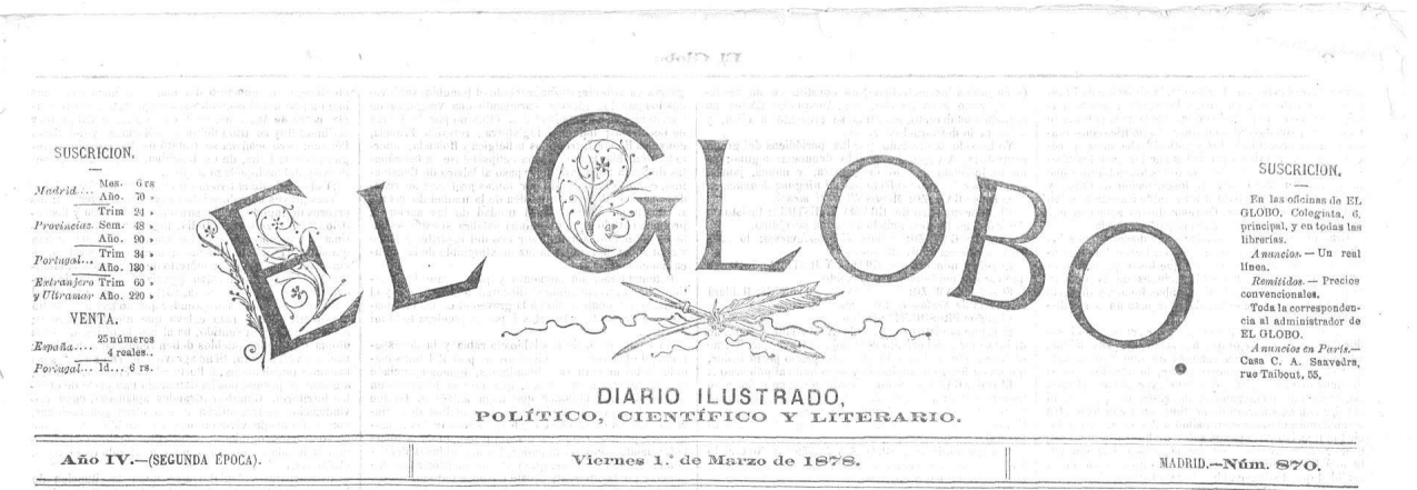 El Globo, cabecera, 1 de marzo de 1878.